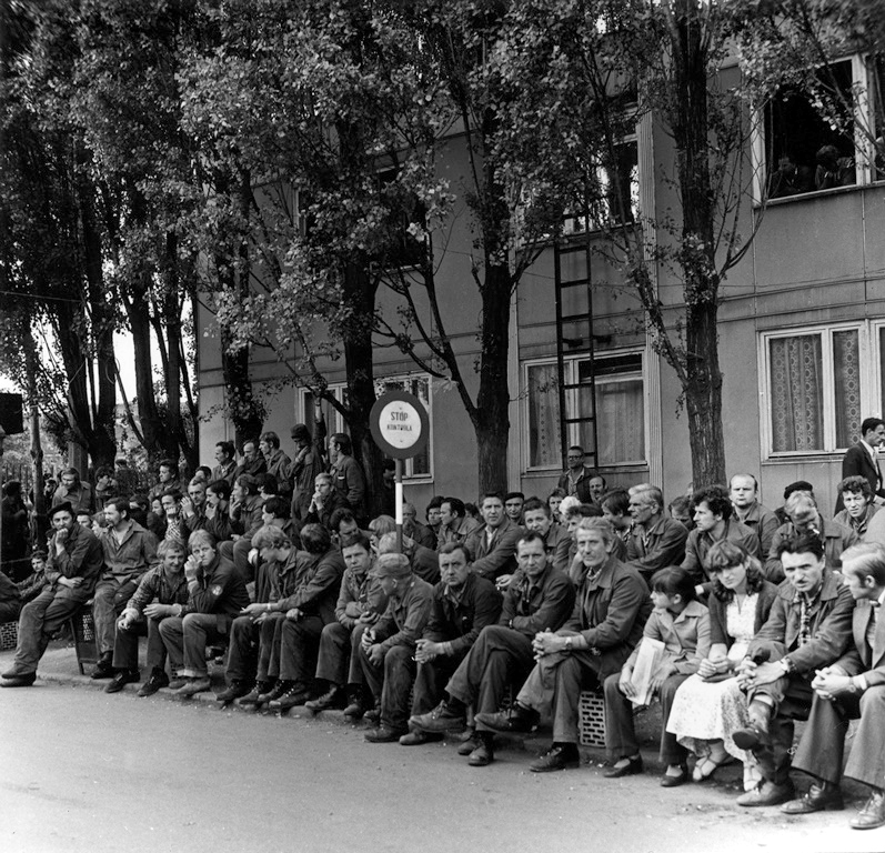 Strajkujący stoczniowcy